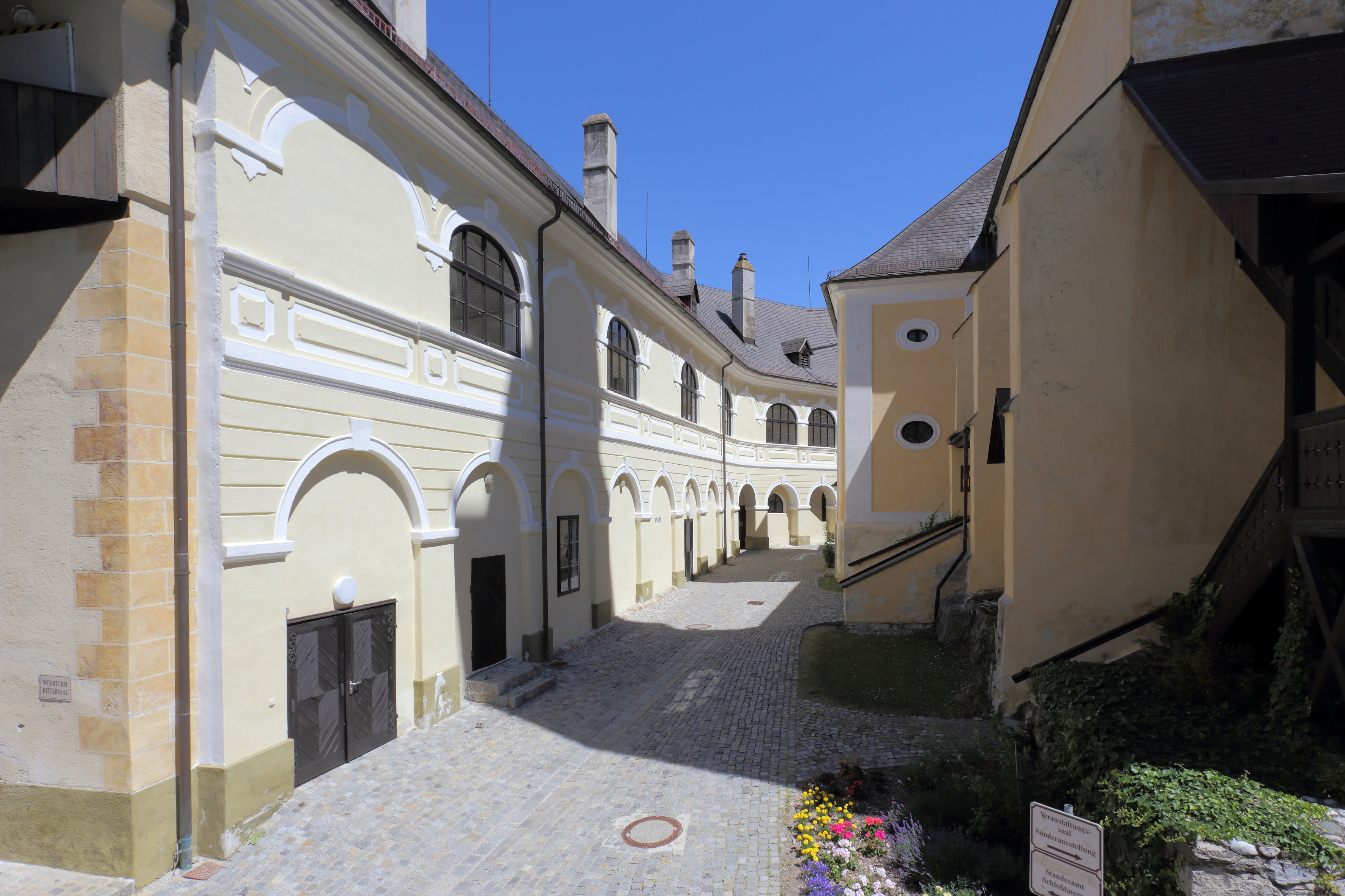 Nordseitiger Trakt des Schlosses Gloggnitz. Ein zweigeschossiger Trakt mit barocker Fassade, wobei der vorgestellte Arkadengang vermauert wurde. Rechts nordseitiges Gemäuer der Schloss- bzw. ehemaligen Pfarrkirche.